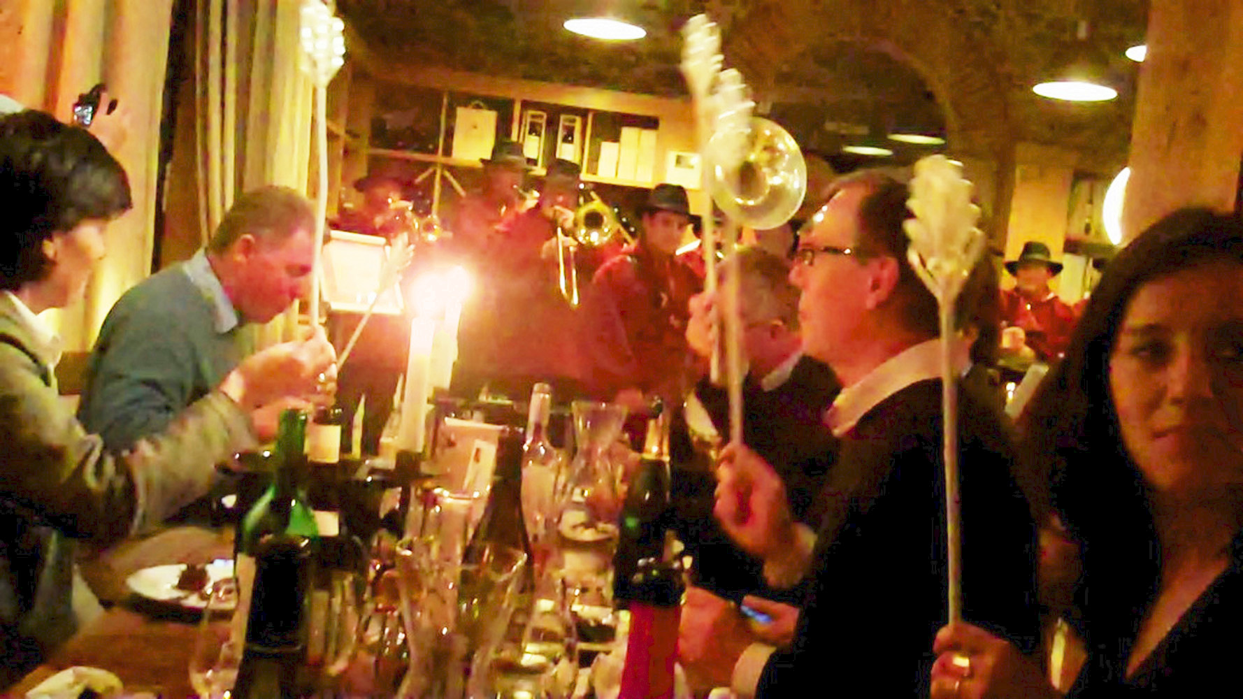 Réception au château Pennautier en Cabardès